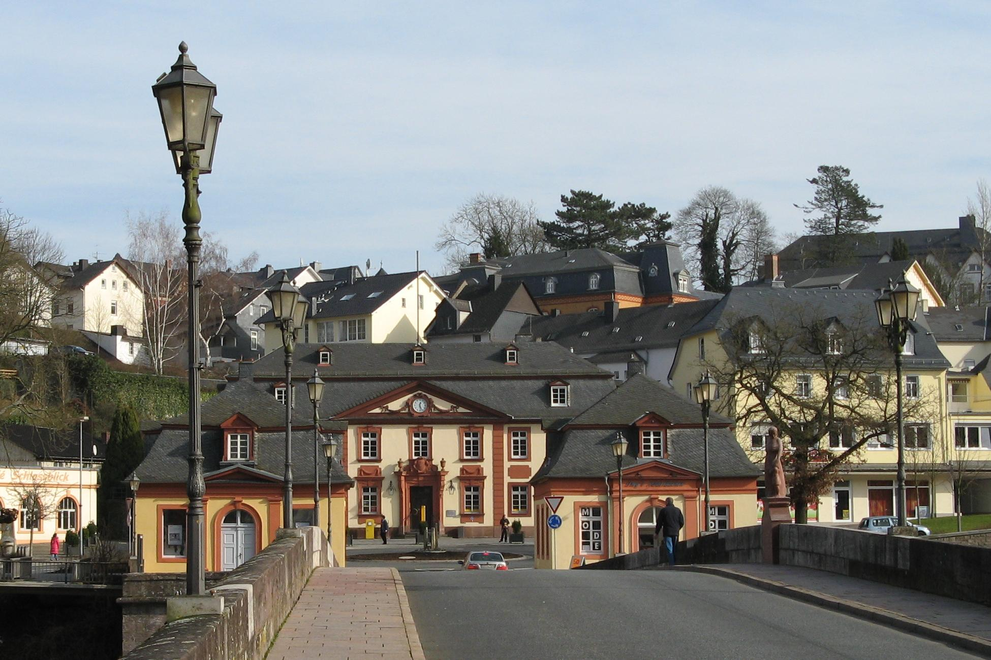 Das 1768 erbaute Weilburger Postamt mit den beiden Brückenhäusern von der Steinernen Brücke aus gesehen